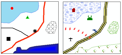 Voorbeelden van abstracte (links) en figuratieve (rechts) symbologie voor punten, lijnen en vlakken.